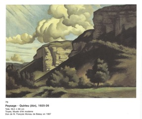 collection privée Moreau de Balasy